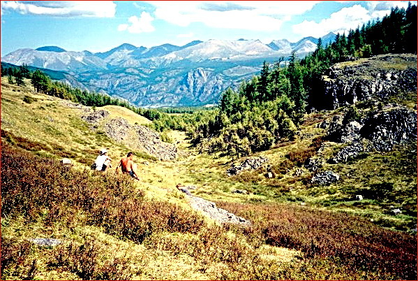 Спиллвей из впадины оз. Кара-Коль на Алтае (Курайского ледниково-подпрудного озера) в долину р. Чуя. Горный Алтай. Фото Тони Брауна.